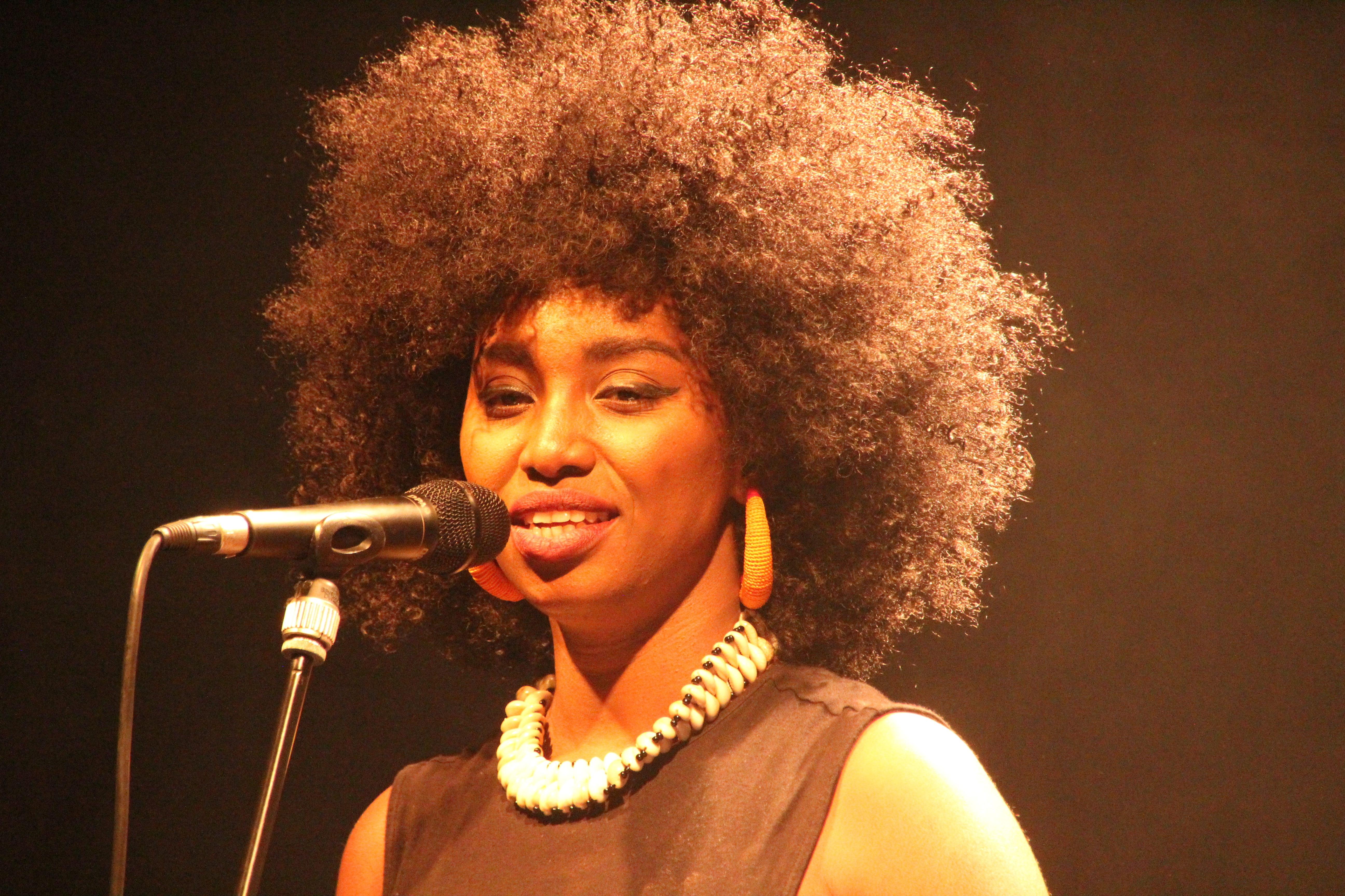 Bildinhalt: Die malische Sängerin Inna Modja bei einem Auftritt in der Hausener Brotfabrik Aufnahmeort: Frankfurt am Main, Deutschland Die dargestellte Künstlerin wurde bei einem öffentlichen Auftritt fotografiert.